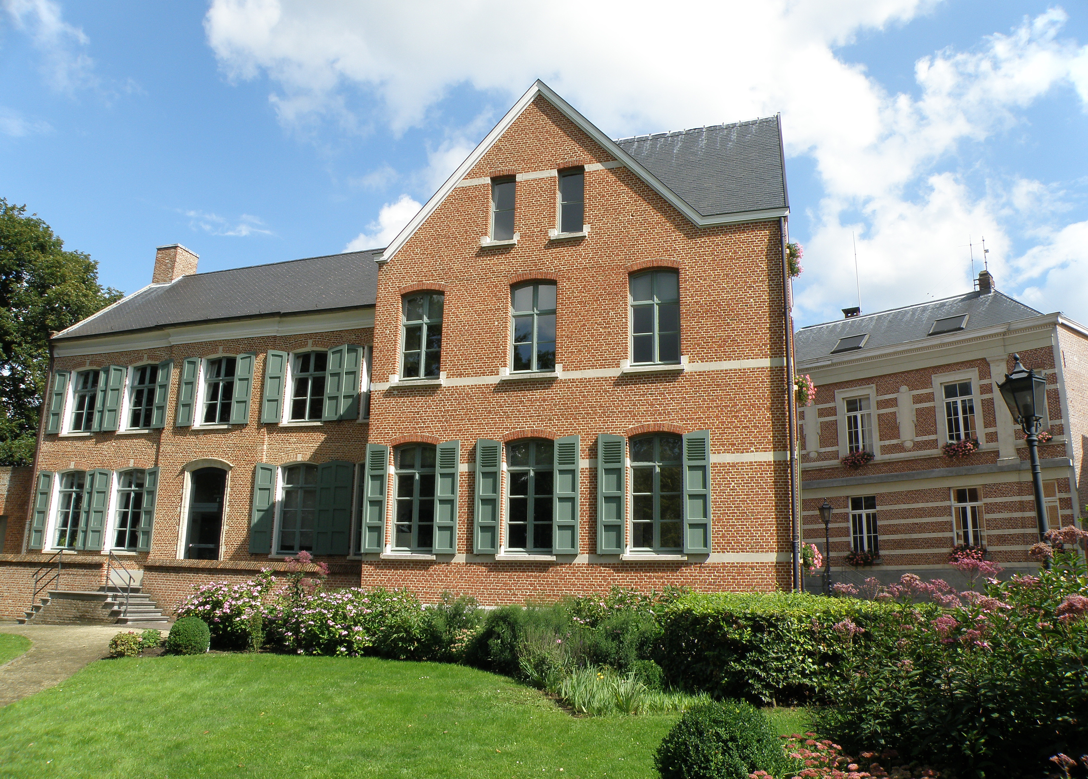 Heist-op-den-Berg, petite ville de la prov. d’Anvers, Belgique (région flamande), à 27km (à vol d’oiseau) au sud-est de la ville d’Anvers. À l'avant-plan, ancien presbytère, aujourd'hui utilisé par l’administration municipale, sis au n°15 Kerkplein (place de l’Église), au sommet de la butte (alt. 45m) sur laquelle la partie ancienne de la ville a été construite. Façade arrière (ouest, côté jardin) de l’édifice, lequel se compose de deux corps de bâtiment contigus: celui de droite (mur gouttereau, ici à gauche), édifié en 1769, mais restauré et remanié par l’archit. Léonard Blomme en 1891; celui de gauche (mur pignon, à droite sur la photo), d’équerre par rapport au premier, construit dans le même style (néo-traditionnel), selon des plans du même Léonard Blomme fin XIXe siècle. Au second plan à droite : bâtiment de style néo-classique (façade latérale), anciennement justice de paix, aujourd'hui incorporé à la maison communale (=mairie) qui le jouxte à sa gauche ; ég. œuvre de l’archit. Léonard Blomme, de 1867.